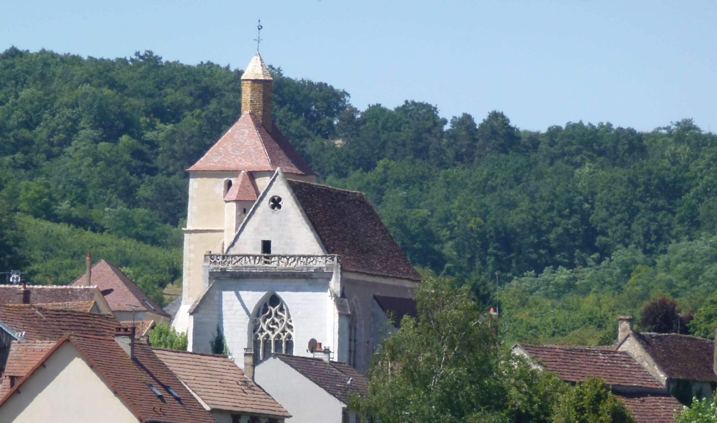 Église de JUSSY Yonne 89290